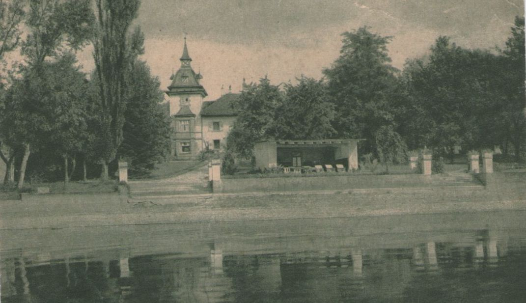 Alte Ansichtskarte: Scheffelhaus, Mettnau, Radolfzell am Bodensee, gelaufen 1928